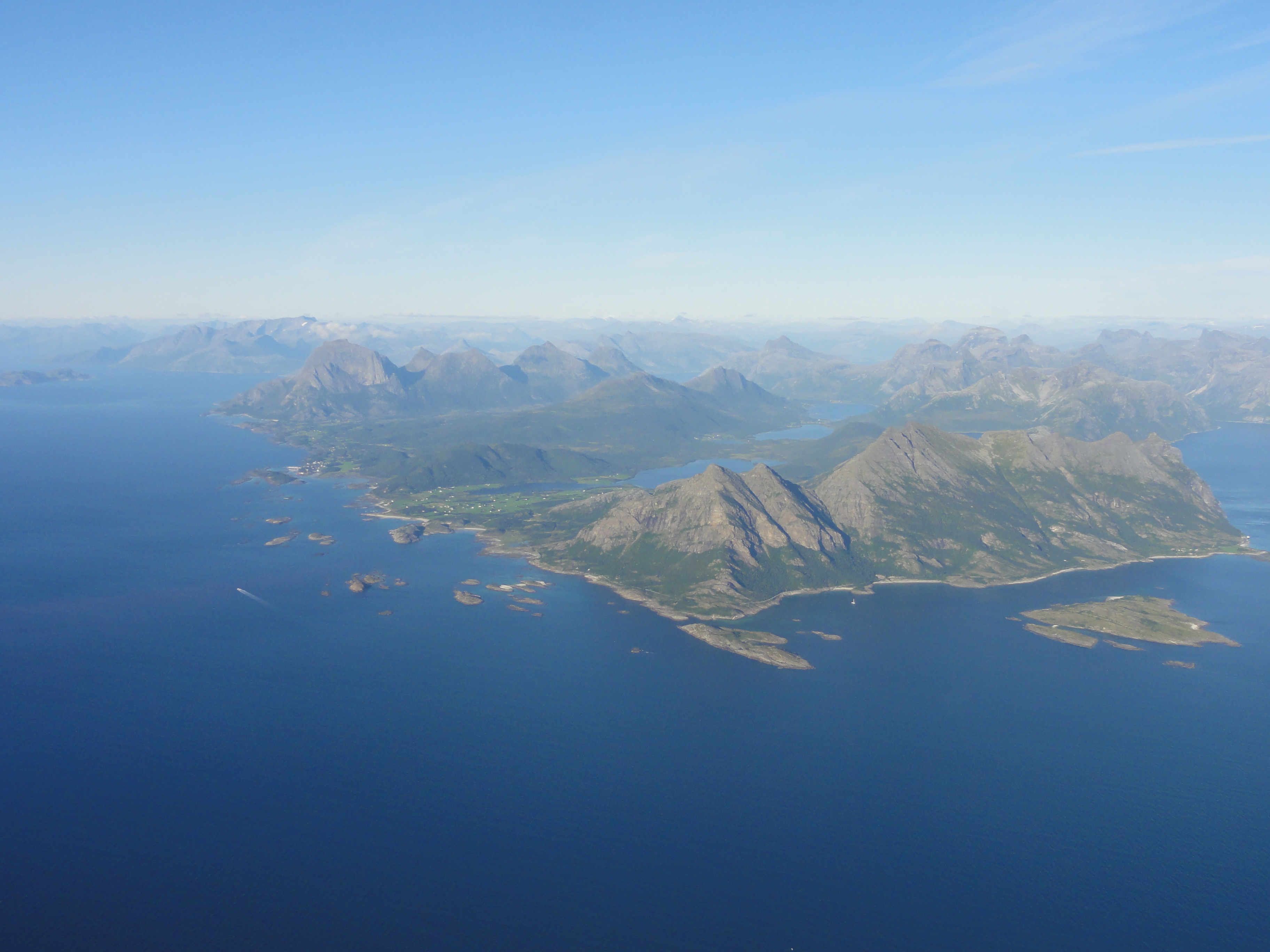 Sørvestre del av Kjerringøy i Bodø kommune. Stedet Fjær sees litt til venstre for senter av bildet. Havstrekningen utenfor øya kalles Karlsøyfjorden. Bakgrunnen i bildet er fjellene i Steigen kommune.